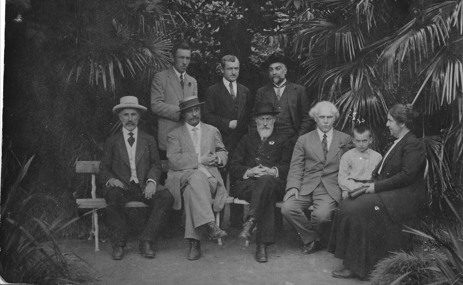 Исидор Квицаридзе, Ной Жордания и Гогита Пагава. Фото Кристины Пагава-Булез.